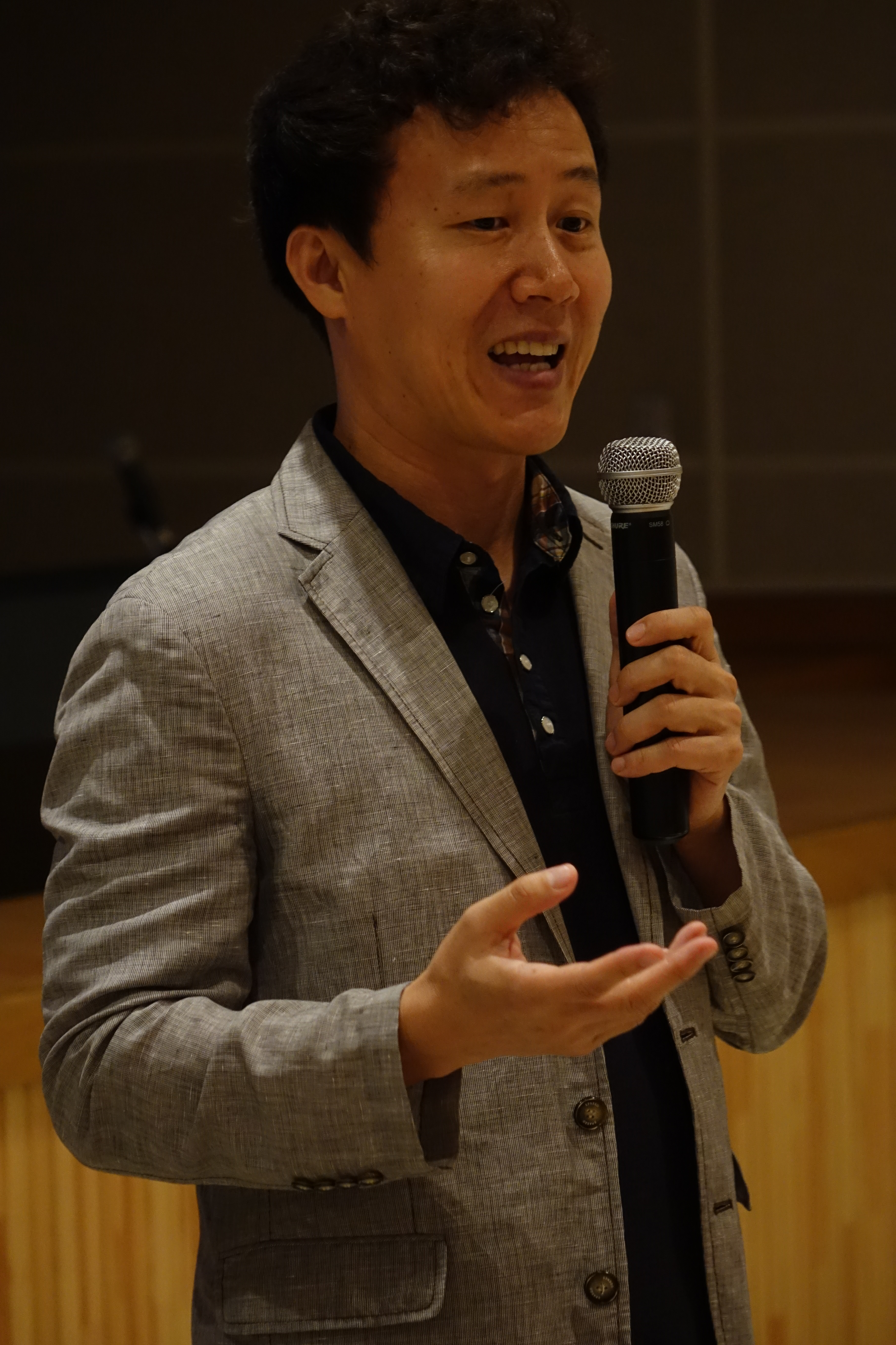 김영훈, 2015년 7월 시민안전파수꾼 안전교육강사 교육과정